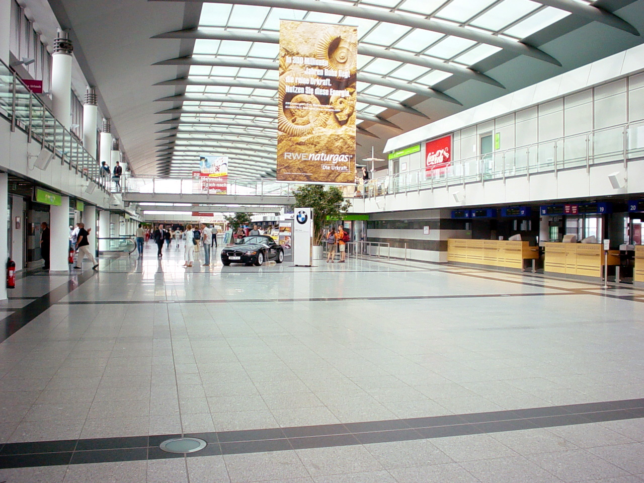 Terminal Flughafen Dortmund vom 28.07.2003